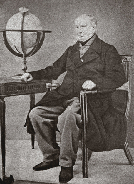 Philippe Vandermaelen (1795-1869), est un éminent géographe et cartographe, célèbre pour un Atlas universel qui fait autorité, et pour avoir fondé l'Établissement Géographique de Bruxelles à Molenbeek-Saint-Jean. Philippe Vandermaelen établit de nombreuses cartes de haut niveau scientifique, à des échelles basées sur le système métrique récemment introduit en Belgique